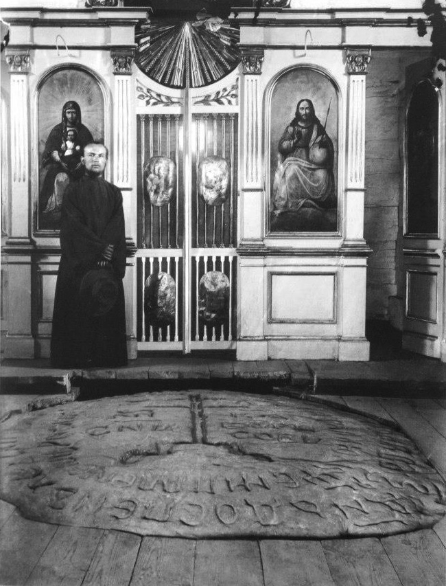 Рогволдов камень в Борисо-Глебской церкви. Деревня Дятловка Оршанского уезда Могилевской губернии.